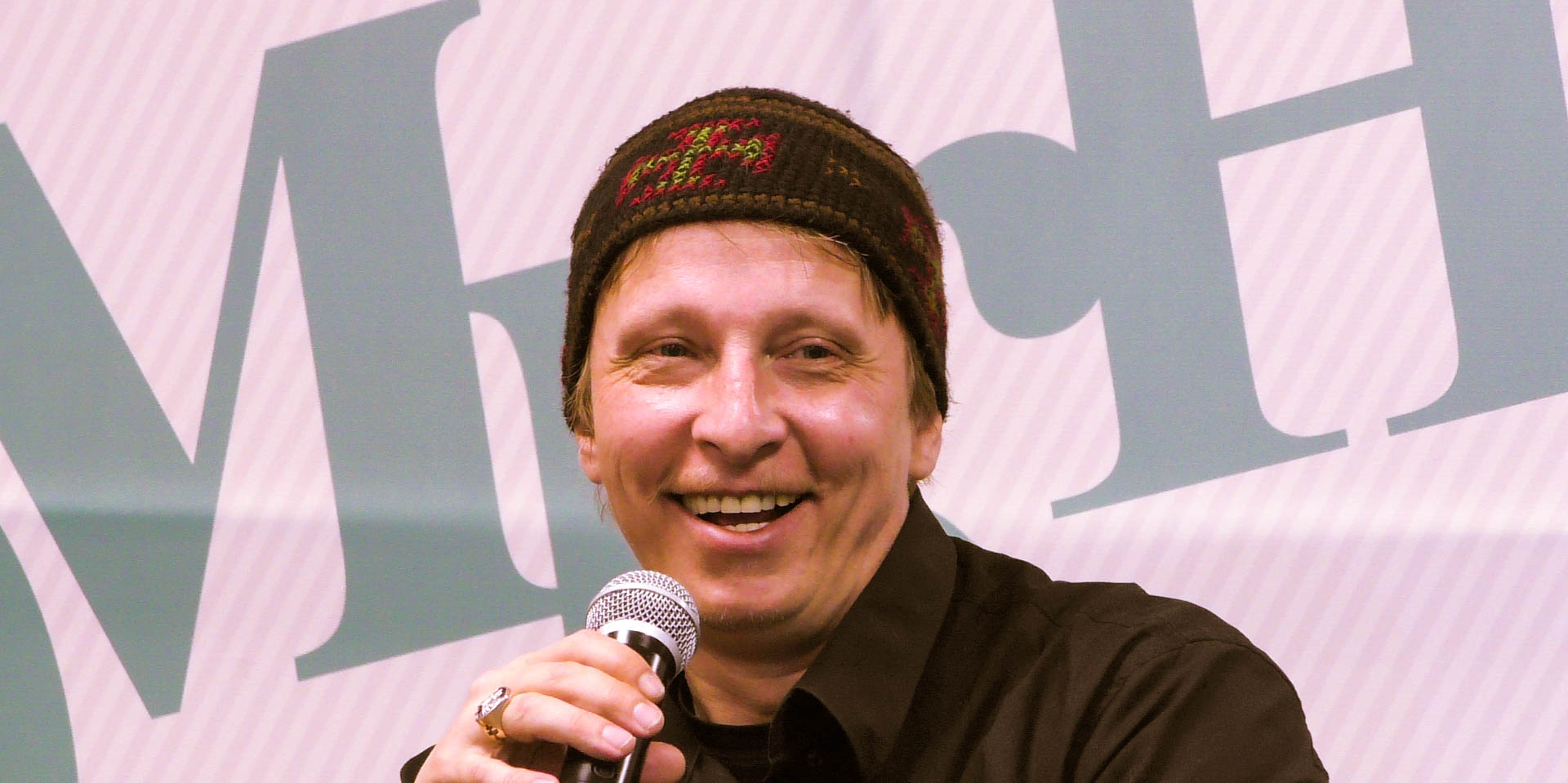 Иван Охлобыстин в Московском доме книги 21.04.2017.